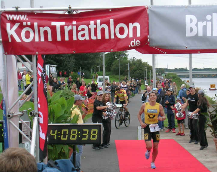 Lothar Leder Triathlon de Cologne 2006